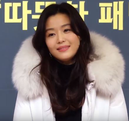 전지현이 12일 오후 서울 중구 소공동 서울 웨스틴 조선호텔에서 열린 브랜드 행사에 참석했다.